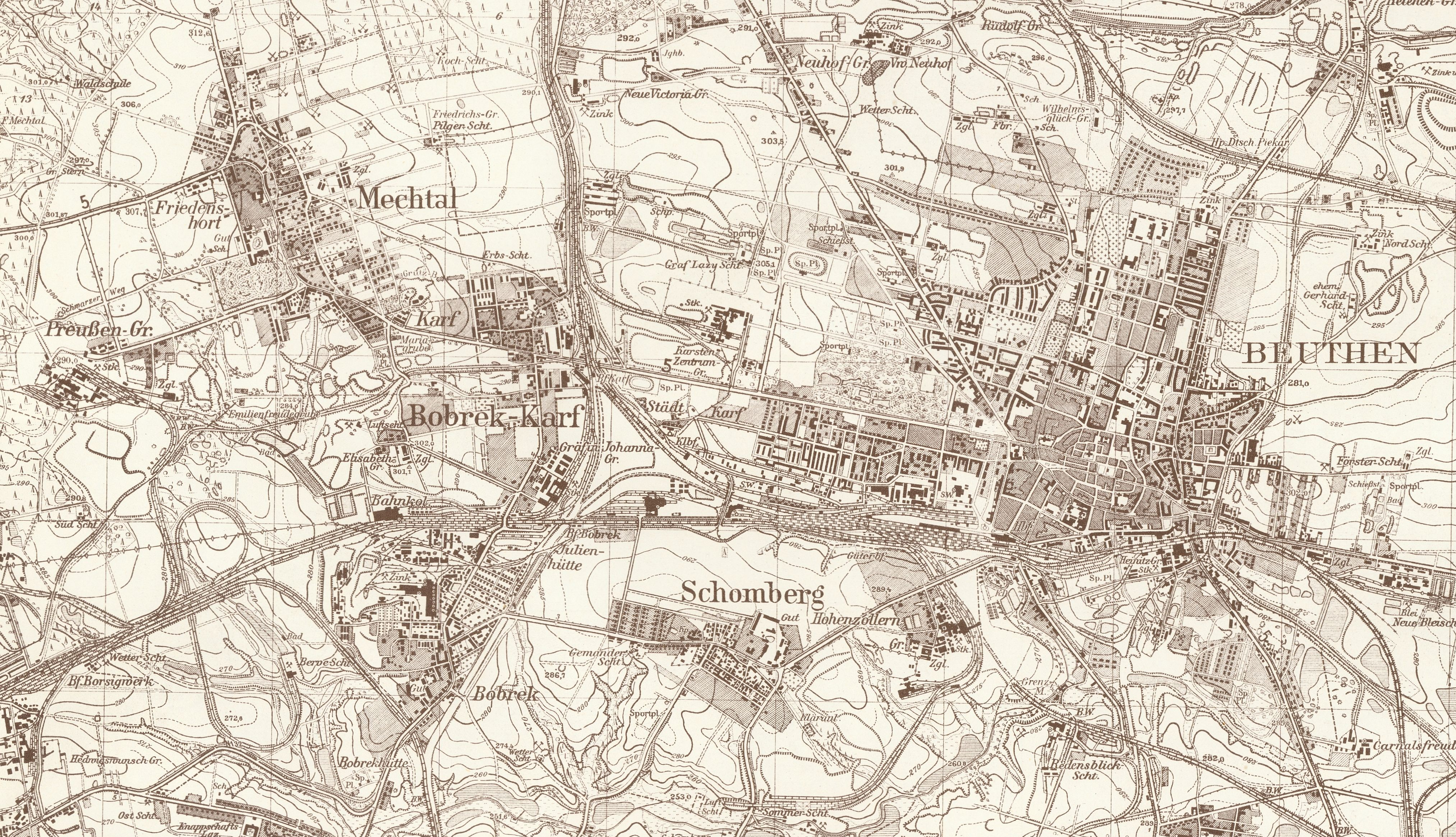 Ausschnitt aus dem Messtischblatt Nr. 5679 (Beuthen O.S.), 1:25.000